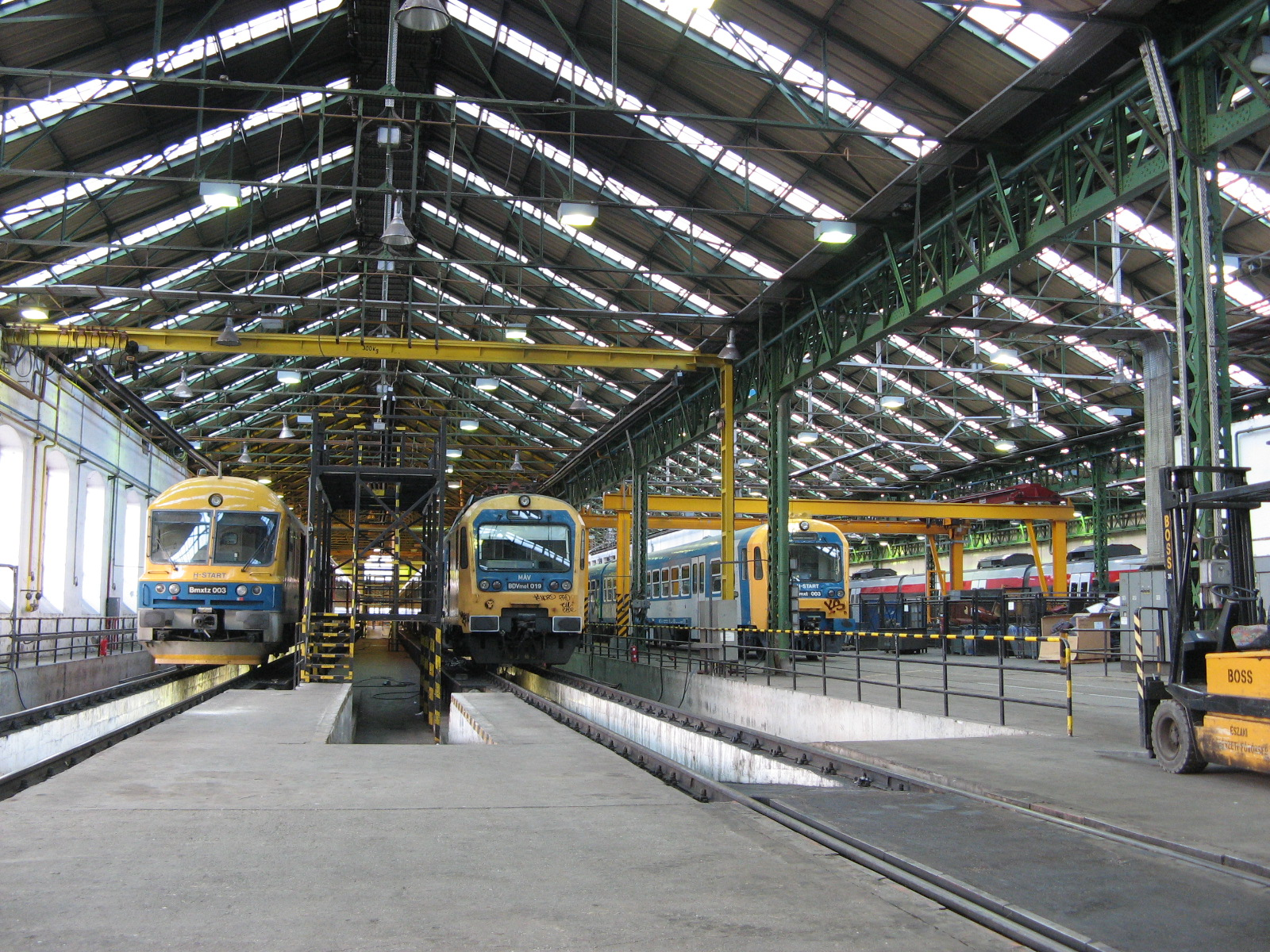 Budapest, Istvántelki Főműhely